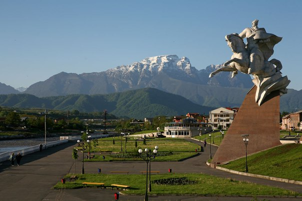 Вид на гору Столовая с Владикавказа